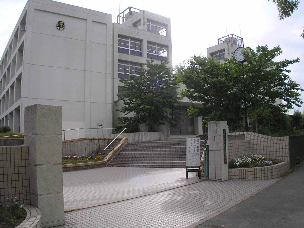 高塚高校全景